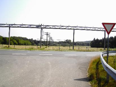 Anflugbefeuerung Westkopf Fliegerhorst Nörvenich Autor: Eigenes Foto von papa1234, aufgenommen am 30.6.06